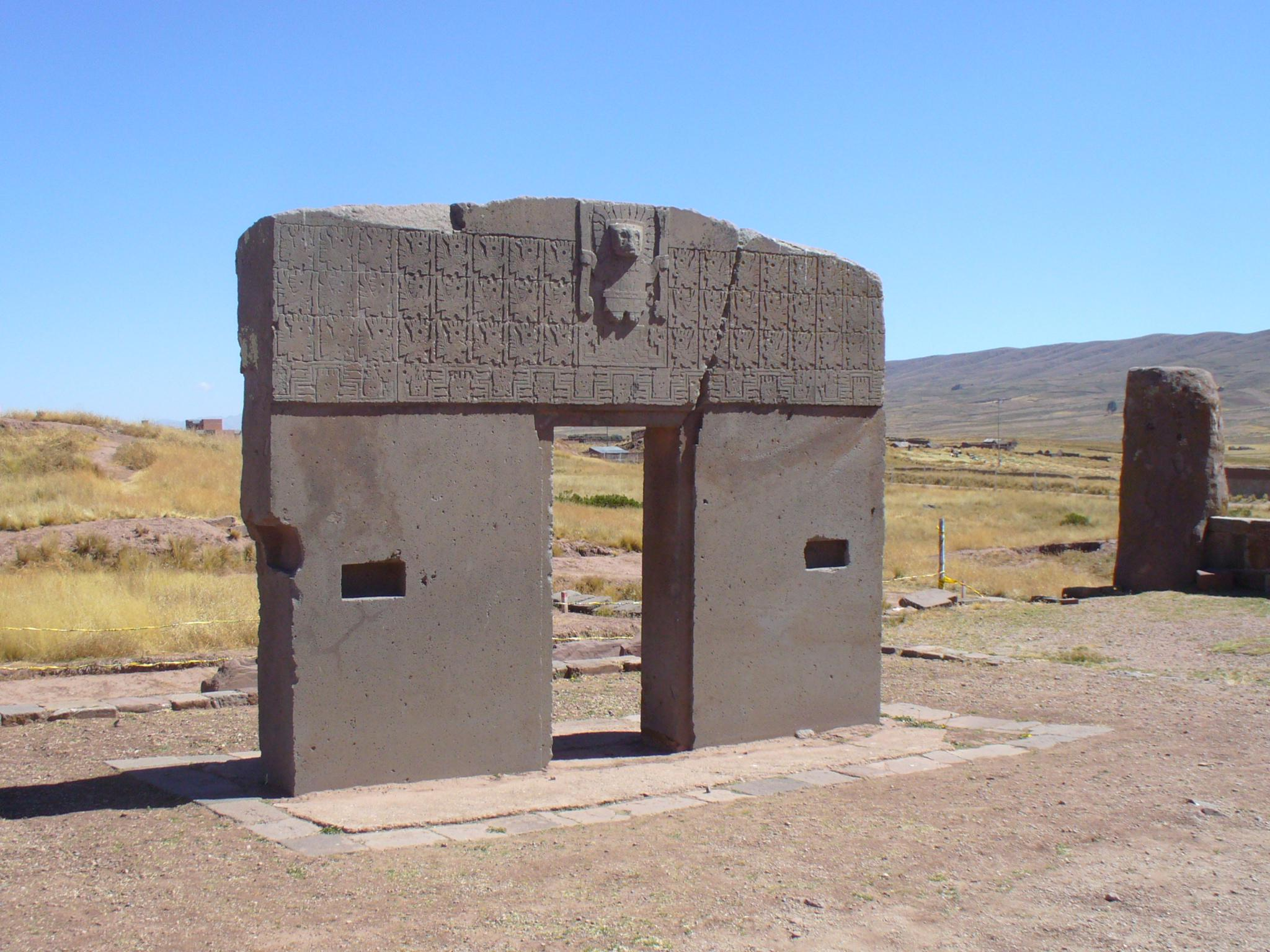 Símbolo de Tiwanaku, ubicada en el Templo de Kalasasaya, no se puede ir a Bolivia y no visitarla. Día 17/05/08 a las 11:33.